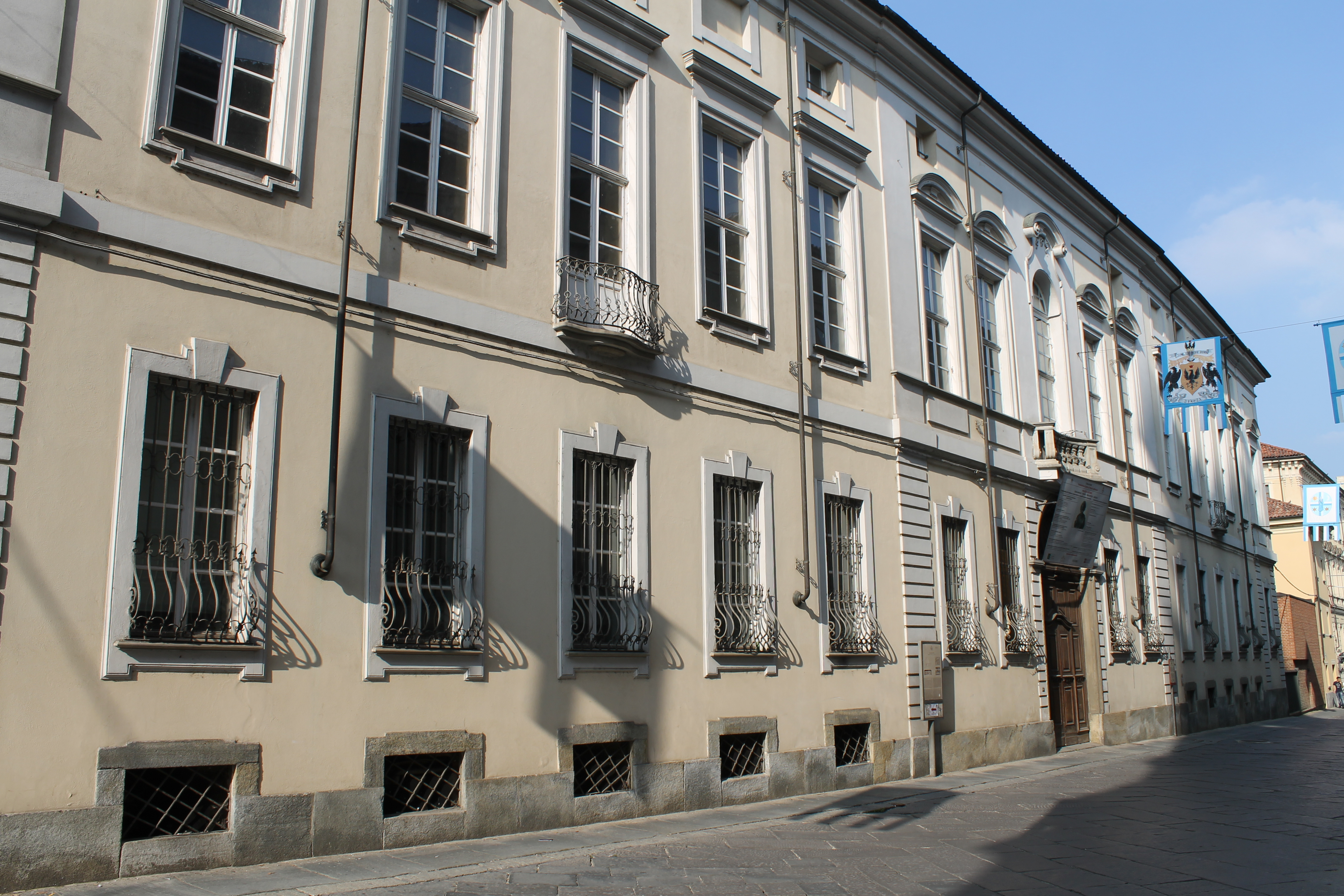 l’esterno di Palazzo Alfieri This is a photo of a monument which is part of cultural heritage of Italy.